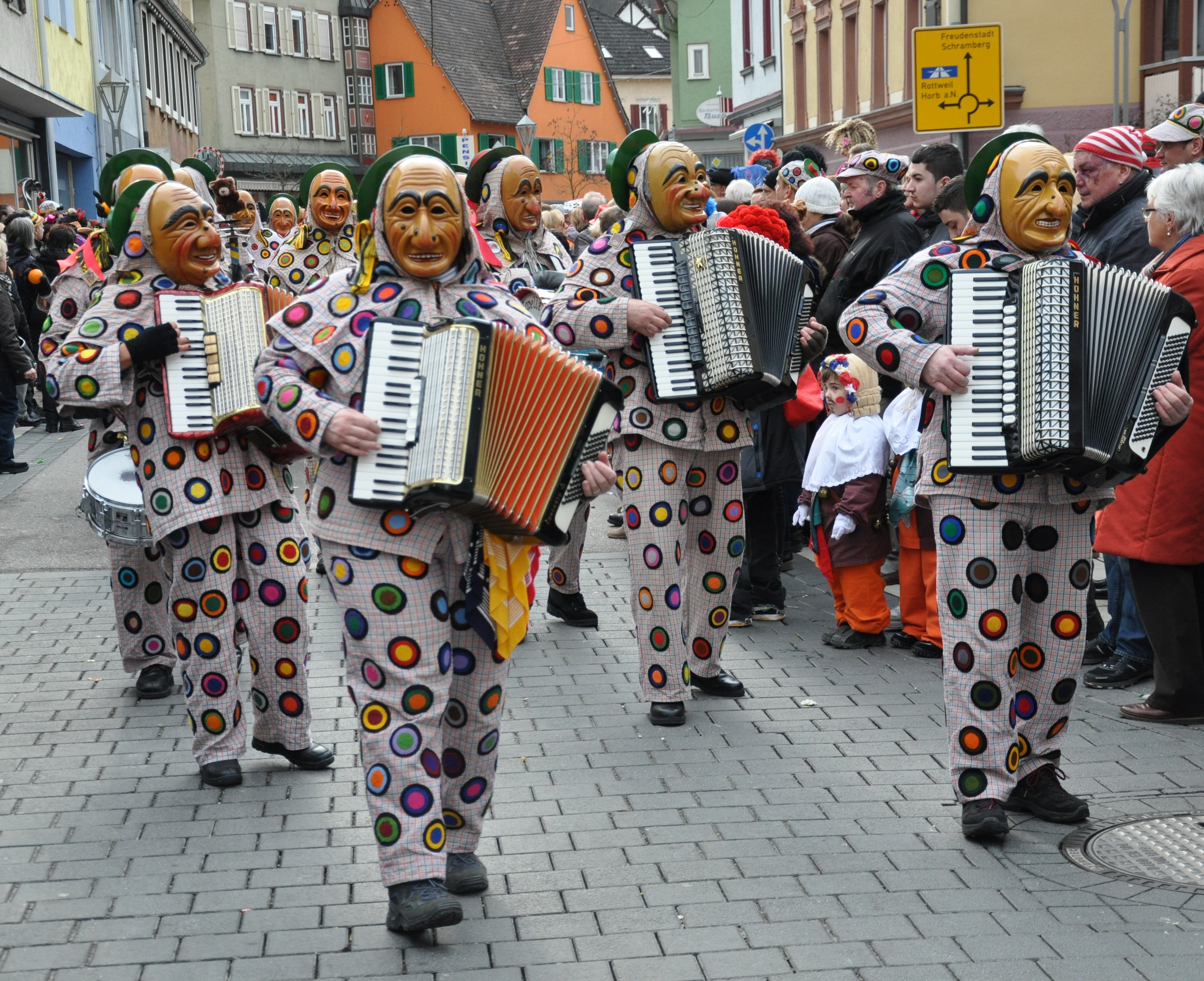 Oberndorf am Neckar, Narrensprung am Fasnetsdienstag nachmittag 2014, Schantlekapelle